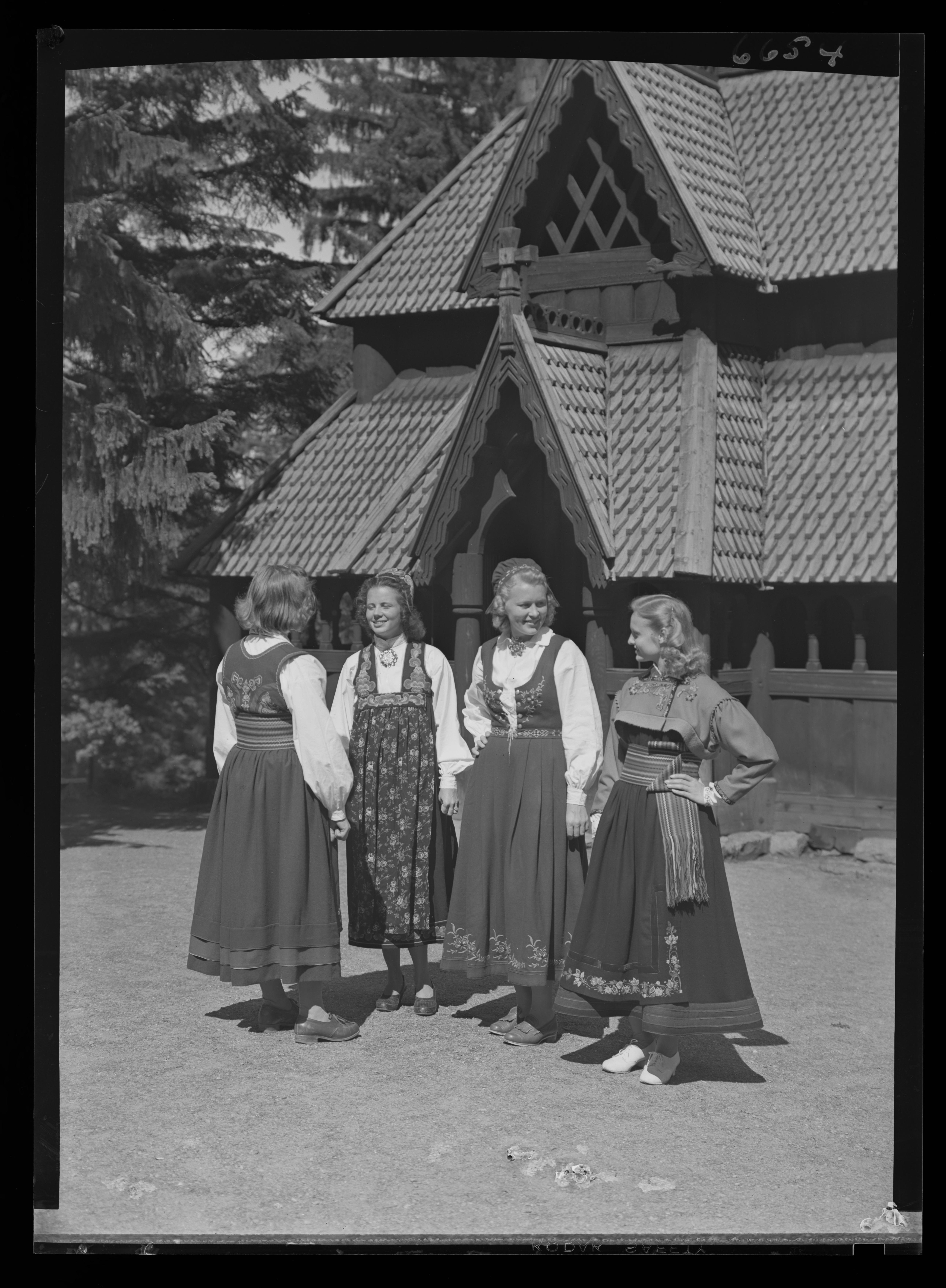 Bildet er hentet fra Nasjonalbibliotekets bildesamling. Anmerkninger til bildet var: Fotograf :Ukjent Bygdøy,Oslo, Oslo, Oslo